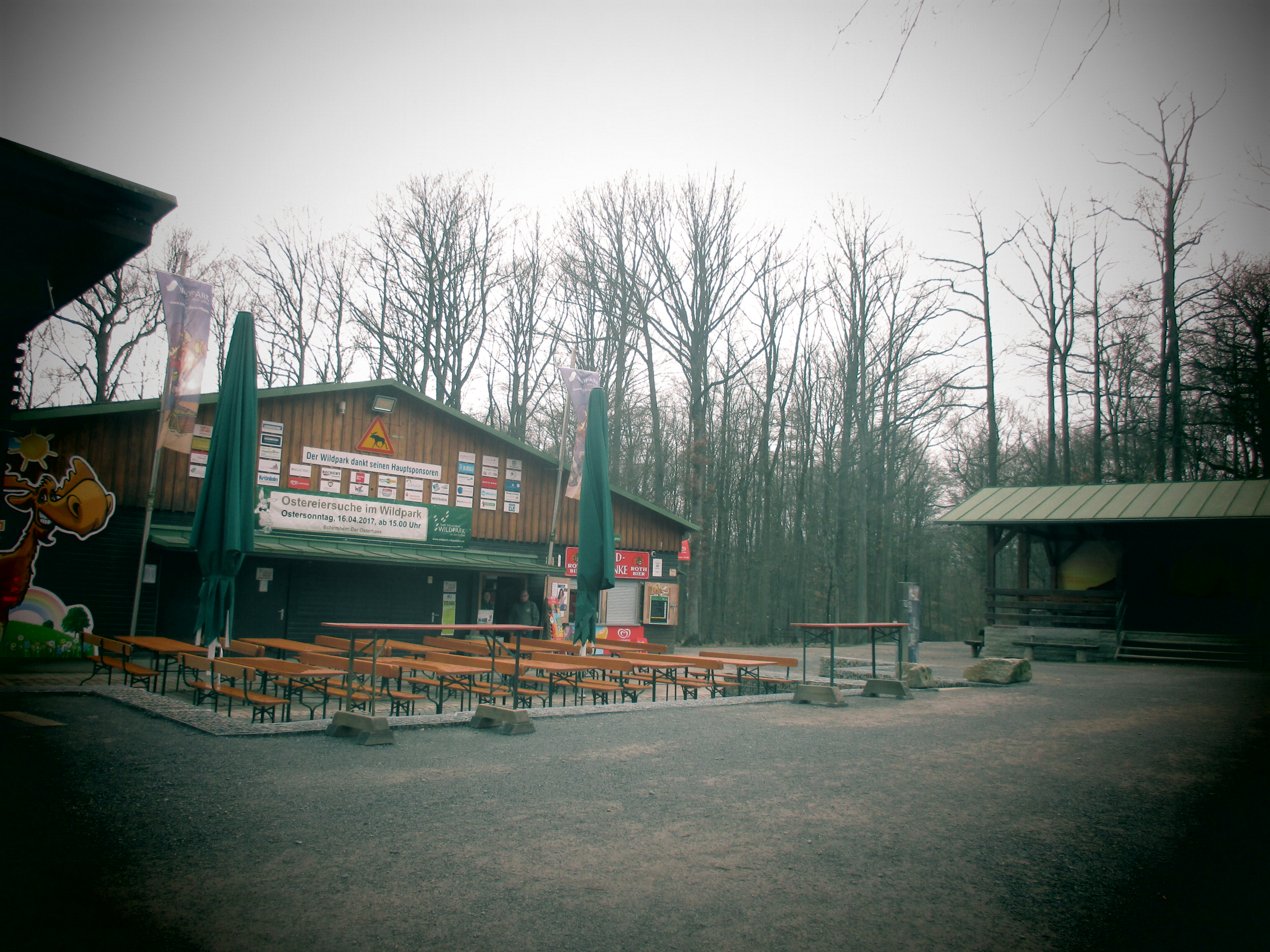 Wildpark Eichen Kiosk